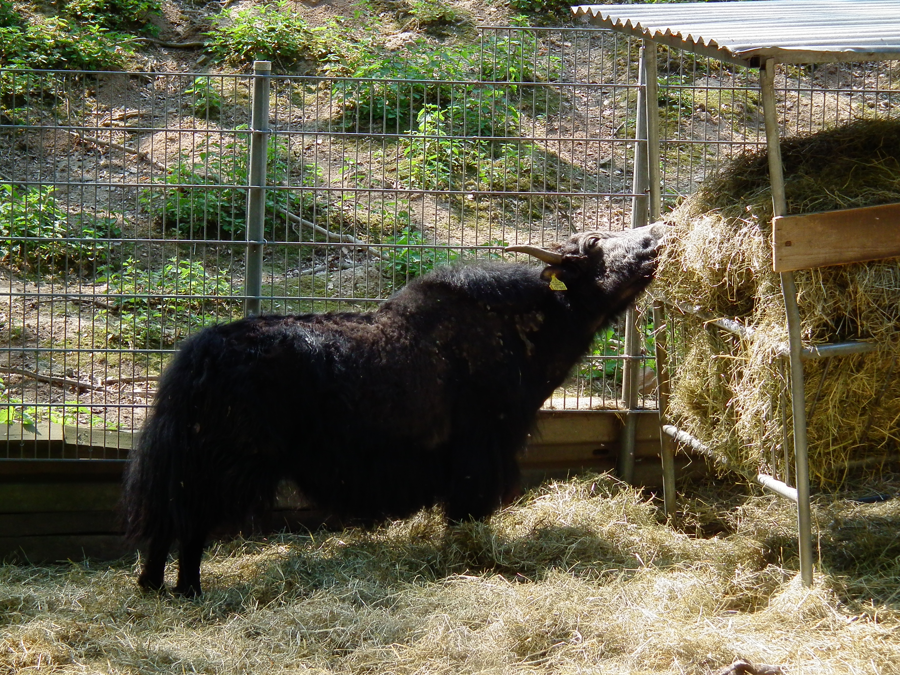 Hausyak (Bos grunniens) im Bergtierpark Erlenbach (Hessen, Deutschland)